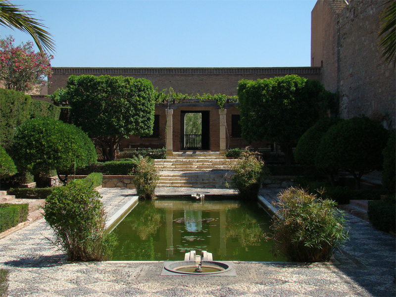 Alcazaba de Almería, Andalucía, España.